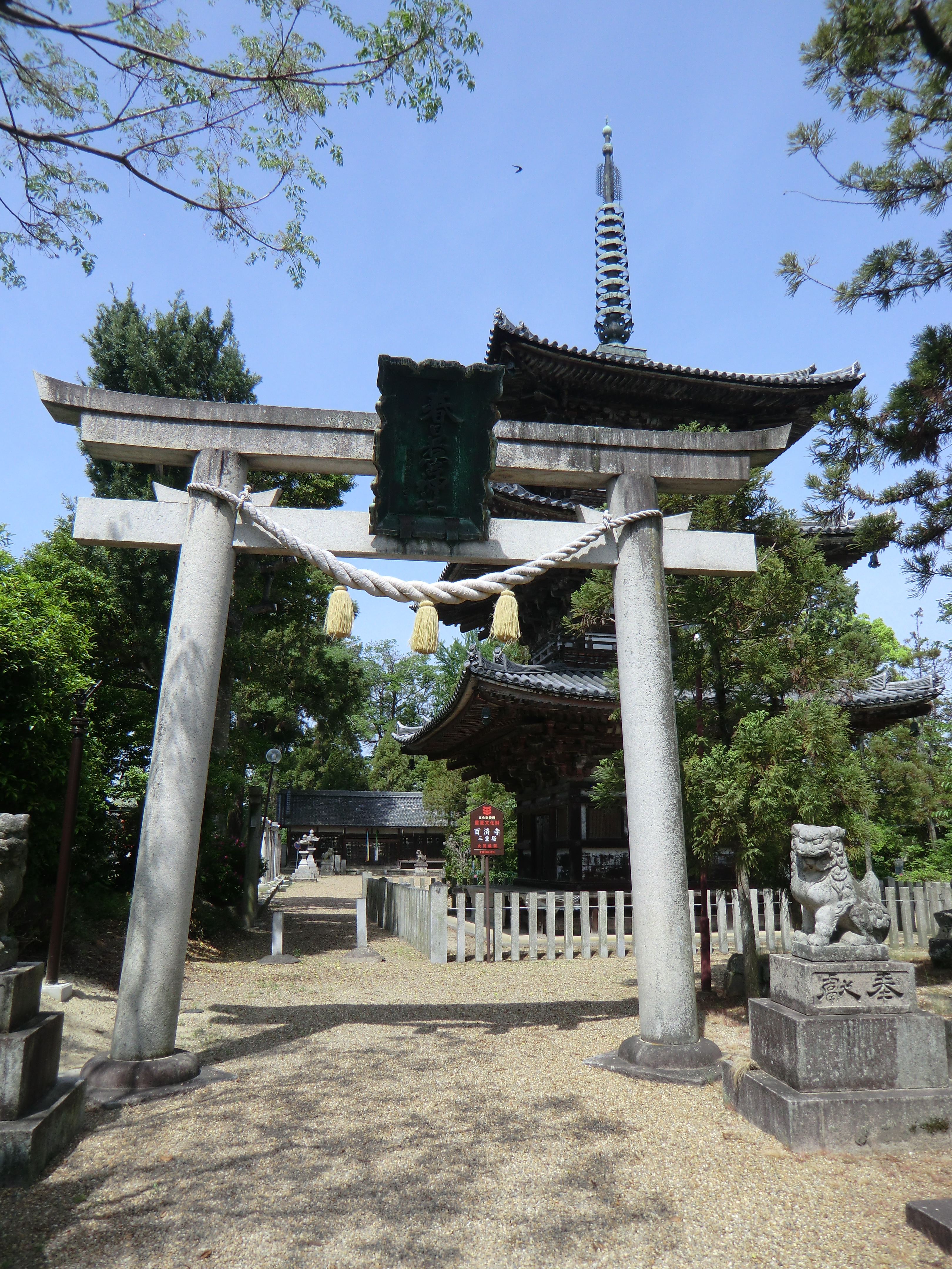 春日若宮神社と百済寺三重塔 (奈良県北葛城郡広陵町大字百済)